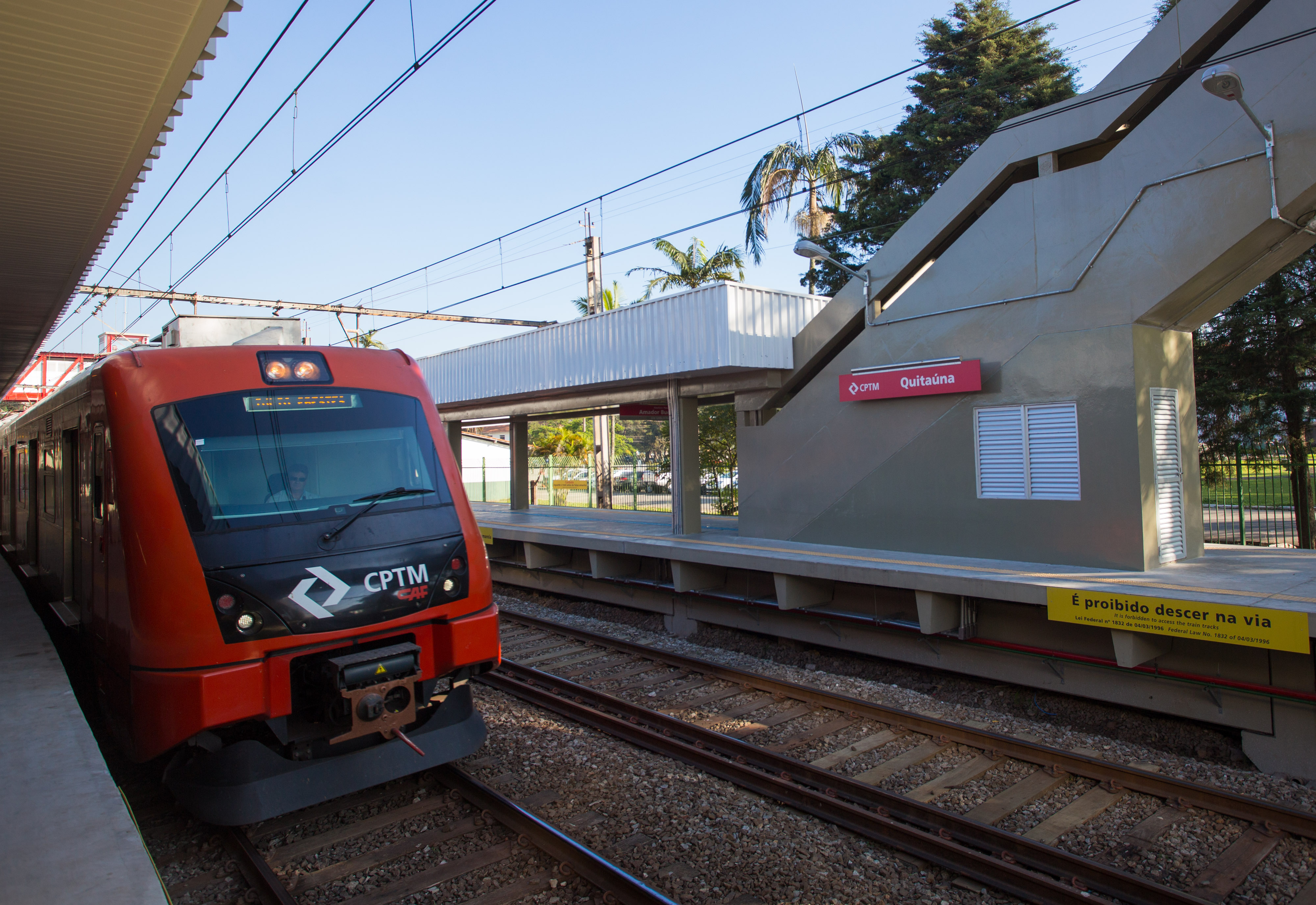 O Governador Geraldo Alckmin, participa da entrega da Estação Quitaúna Osasco - Linha 8 CPTM.DATA 26/06/2017. LOCAL: Osasco/SP. FOTO: Diogo Moreira